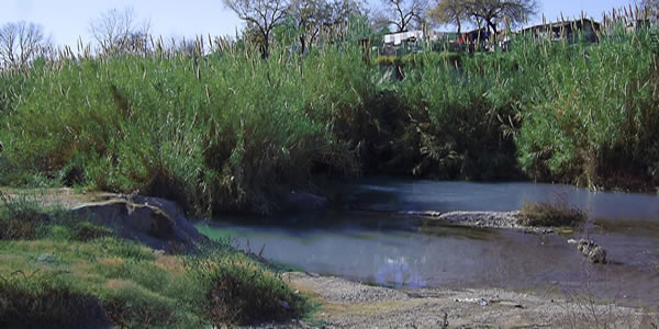 Río Escondido. Este pequeño arroyo se desbordó el 4 de abril de 2004, su cauce aumentó debido a una lluvia de unas cuantas horas de más de 30 pulgadas registrada en la Serranía del Burro. Esto provocó que se rompieran las pequeñas represas y que la comunidad de Villa de Fuente se viera afectada con una inundación que en algunos puntos superó los diez metros. Foto tomada el 2 de Enero de 2006. Manuel Velez.